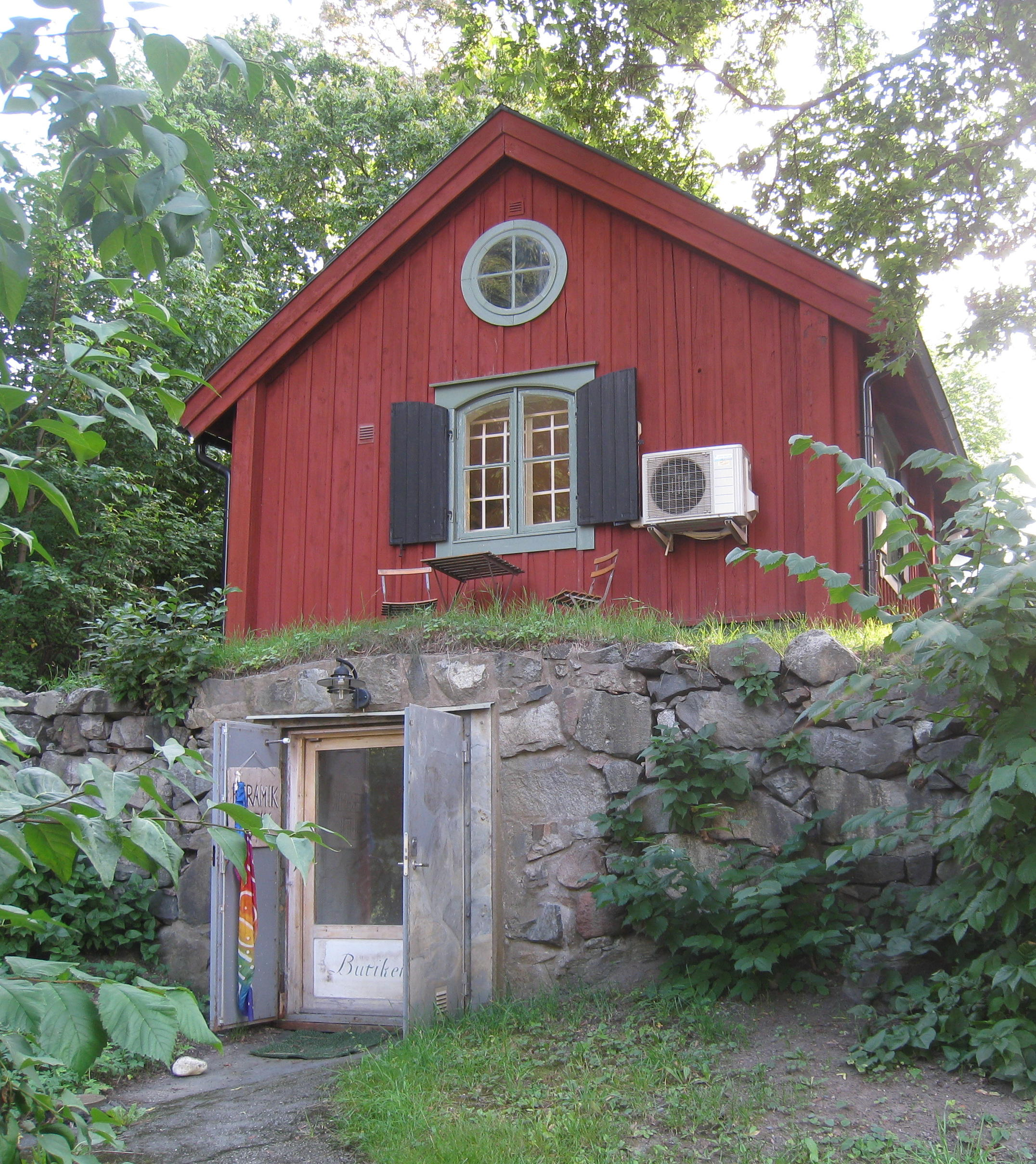 Alviks rättarbostad, '"Alvikstorpet", i Alvik i Bromma i västra Stockholm.